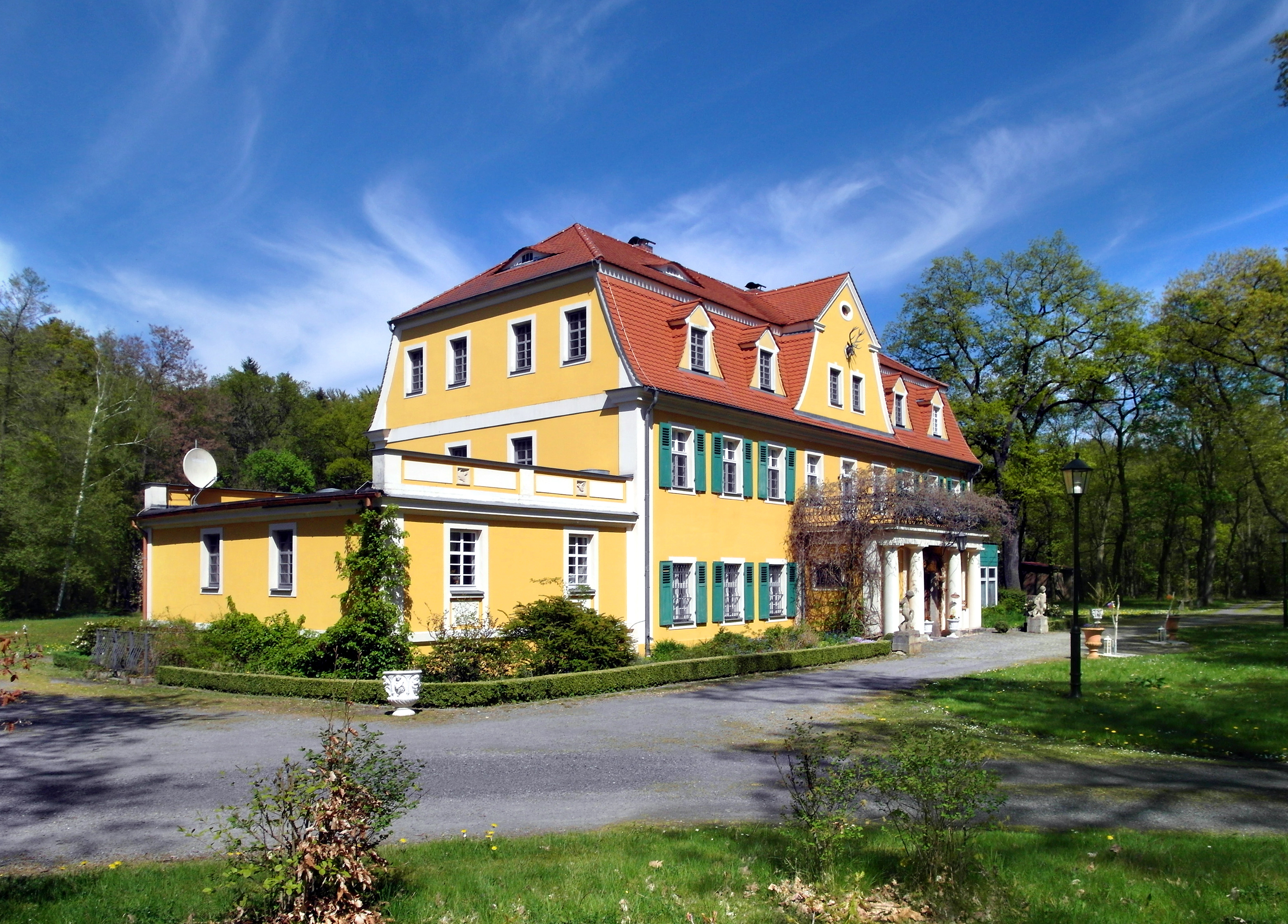 06.05.2016 02999 Weißig (Lohsa): „Fledermausschloß Weißig“ (GMP: 51.331251,14.392067), Am Eichberg 42. Das Anwesen geht auf das 17. Jahrhundert zurück. Der heutige Barockbau dürfte Mitte des 18. Jahrhunderts entstanden sein. Das Haus diente am Anfang des 20. Jahrhunderts als Jagdschloß d. Rittergutsfamilie derer von Steinitz-Kolbitz. 1921 wurde d. Gut Weißig von Ulrich Prinz von Schönburg-Waldenburg erworben. Das Schloß diente noch bis 1997 als Wohnhaus. 1996 kaufte Fam. Liepert das Anwesen und sanierten es. 1998 war die Eröffnung als "FLEDERMAUSSCHLOSS" Weißig. [SAM5724.JPG]20160606530DR.JPG(c)Blobelt Hornjoserbsce: Hród z 18. lětstotka we Wysokej pola Łaza.